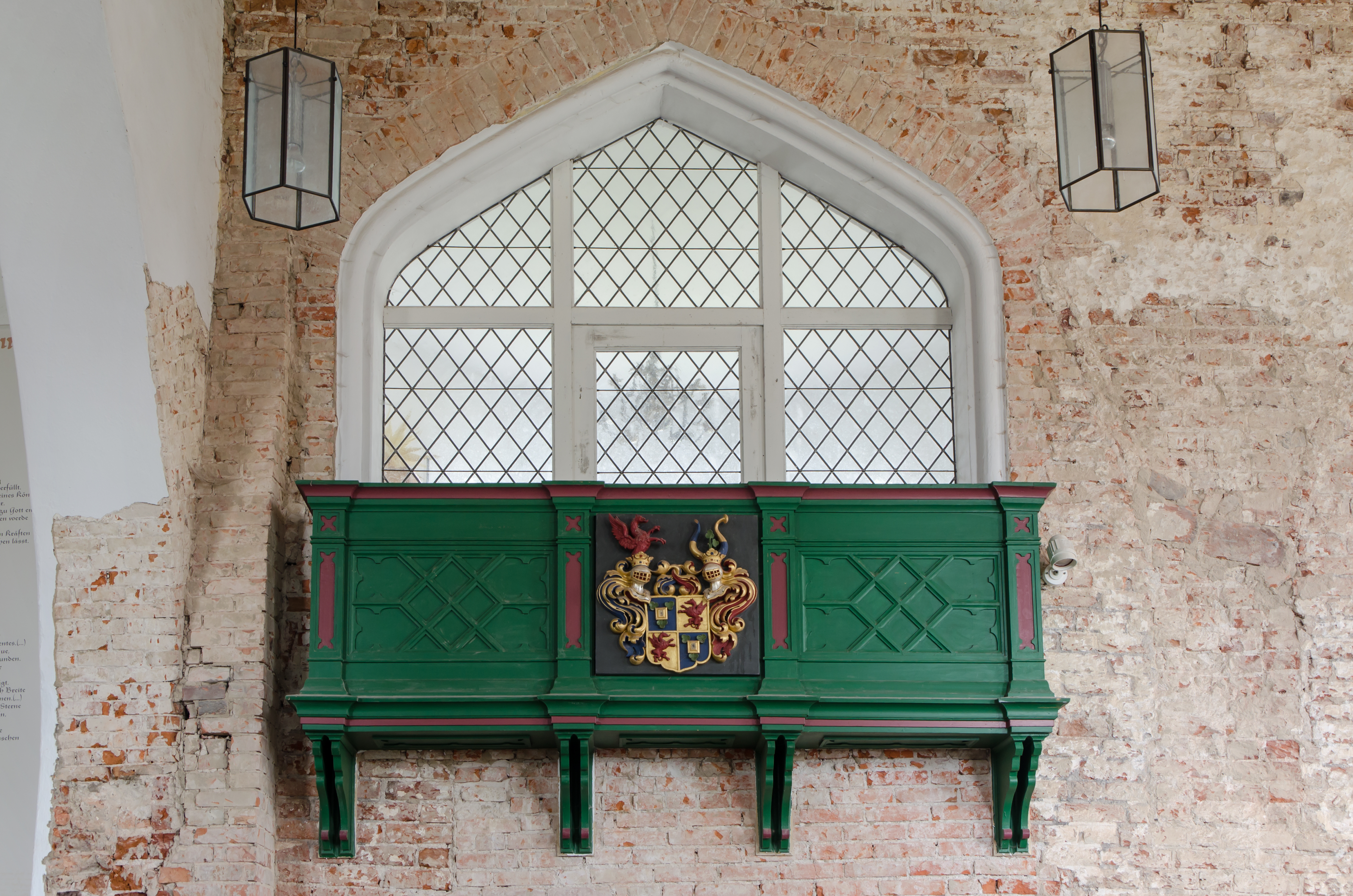 Krummin St, Michael Loge